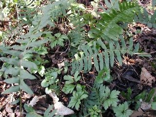 Polypodium vulgare